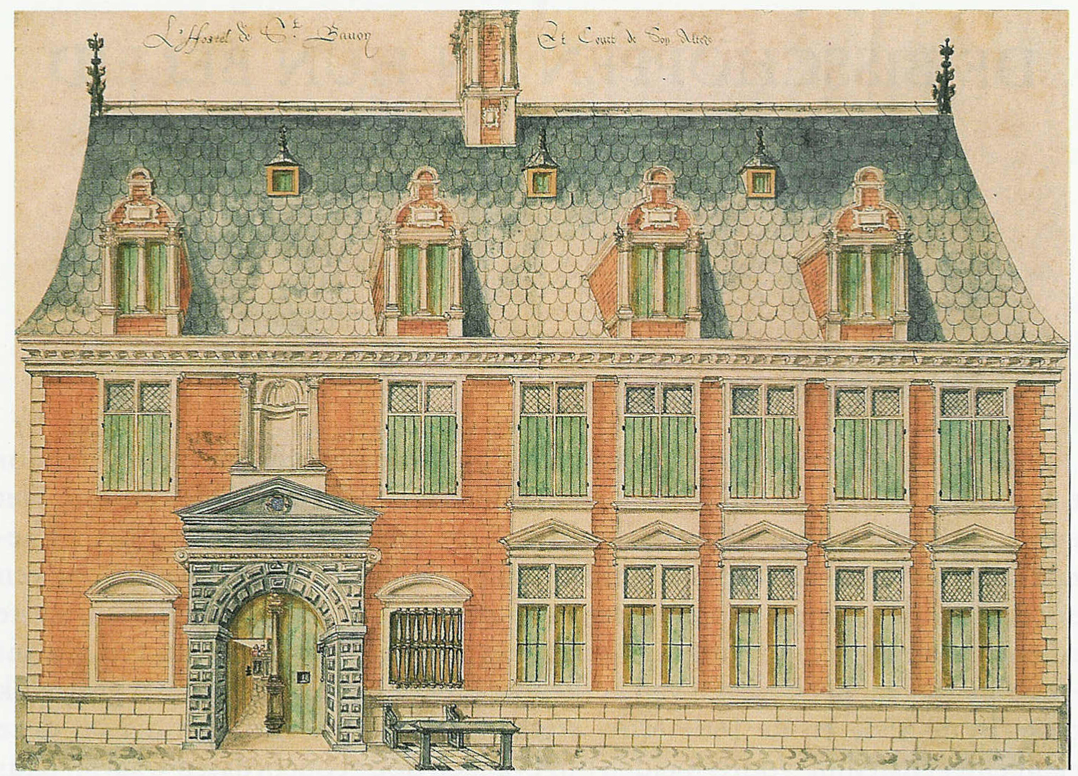 Aquarel van het Hof van Sint-Baafs uit 1585 - Gent - Oost-Vlaanderen - België. Een niet meer bestaand gebouw.